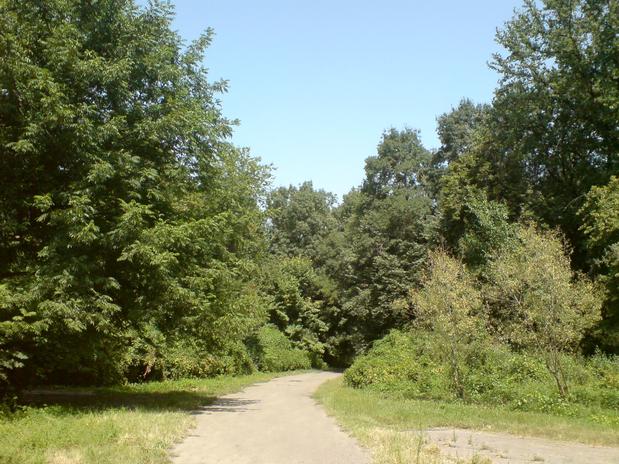 На северной дорожке в Ботаническом саду Ташкента